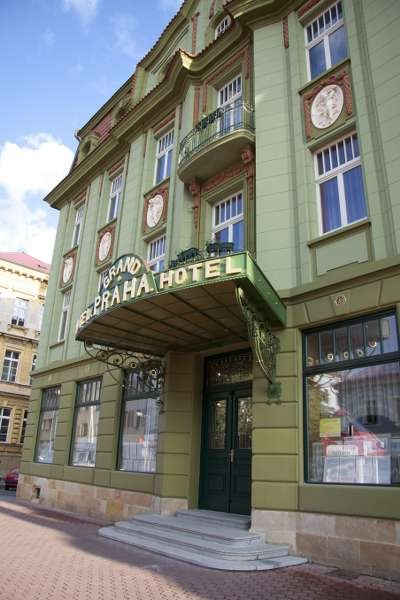 Grand Hotel Praha